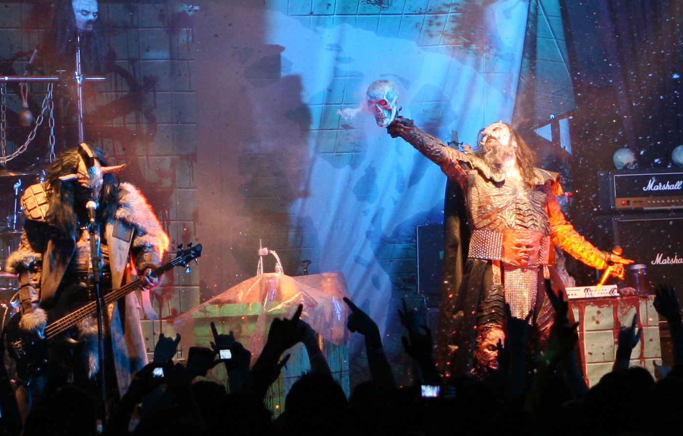 Lordi en la Sala Apolo de Barcelona el 20 de Febrero de 2009